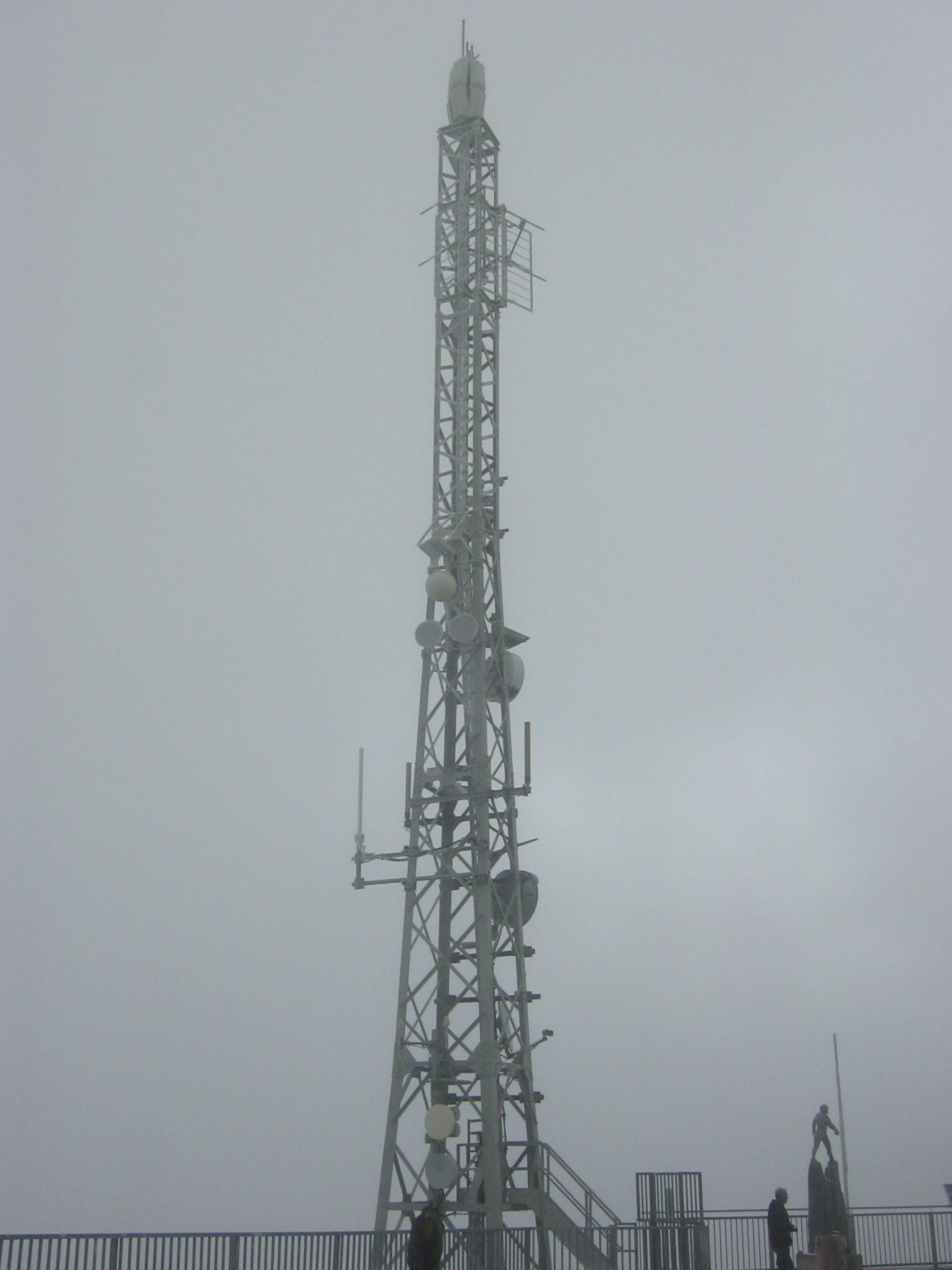 ORF-Sendeturm auf der Zugspitze